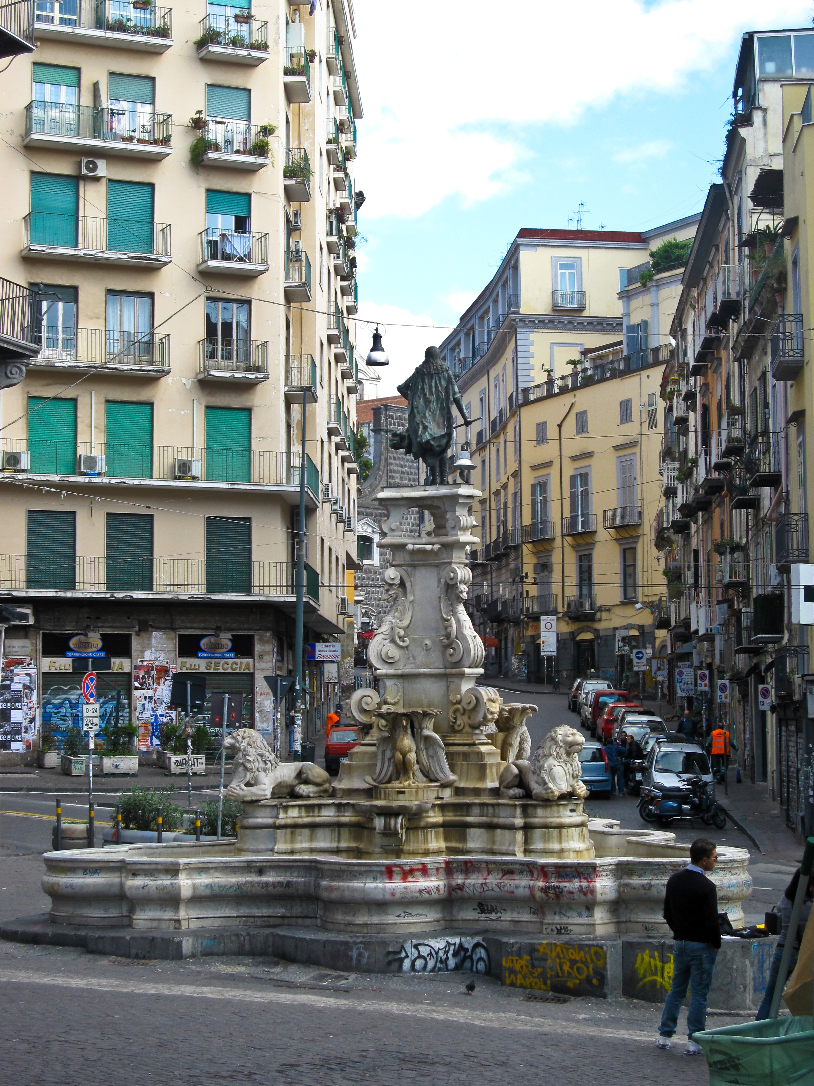 Sul fondo della omonima piazza, in prossimità della facoltà di Architettura (Palazzo Gravina) si trova la fontana di Monteoliveto. Costruita nel 1668 circa da Antonio Cafaro con basamento in piperno massiccio e la vasca in marmo. L'acqua sgorga dalla bocca di tre leoni, mentre altrettante aquile sorreggono il basamento su cui è posta la statua in bronzo di Carlo II di Spagna bambino.